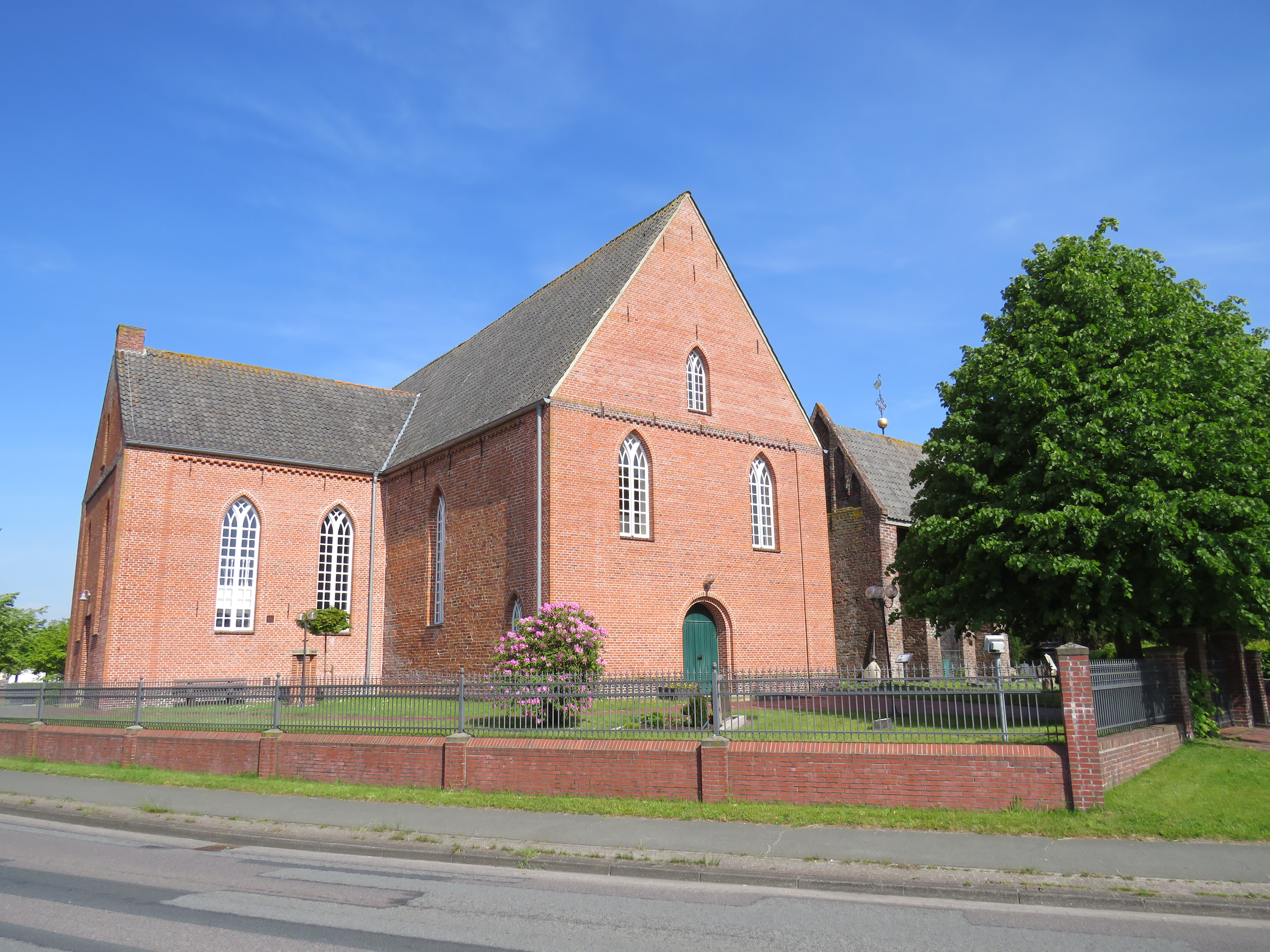 Barbara-Kirche (Strackholt) aussen 2